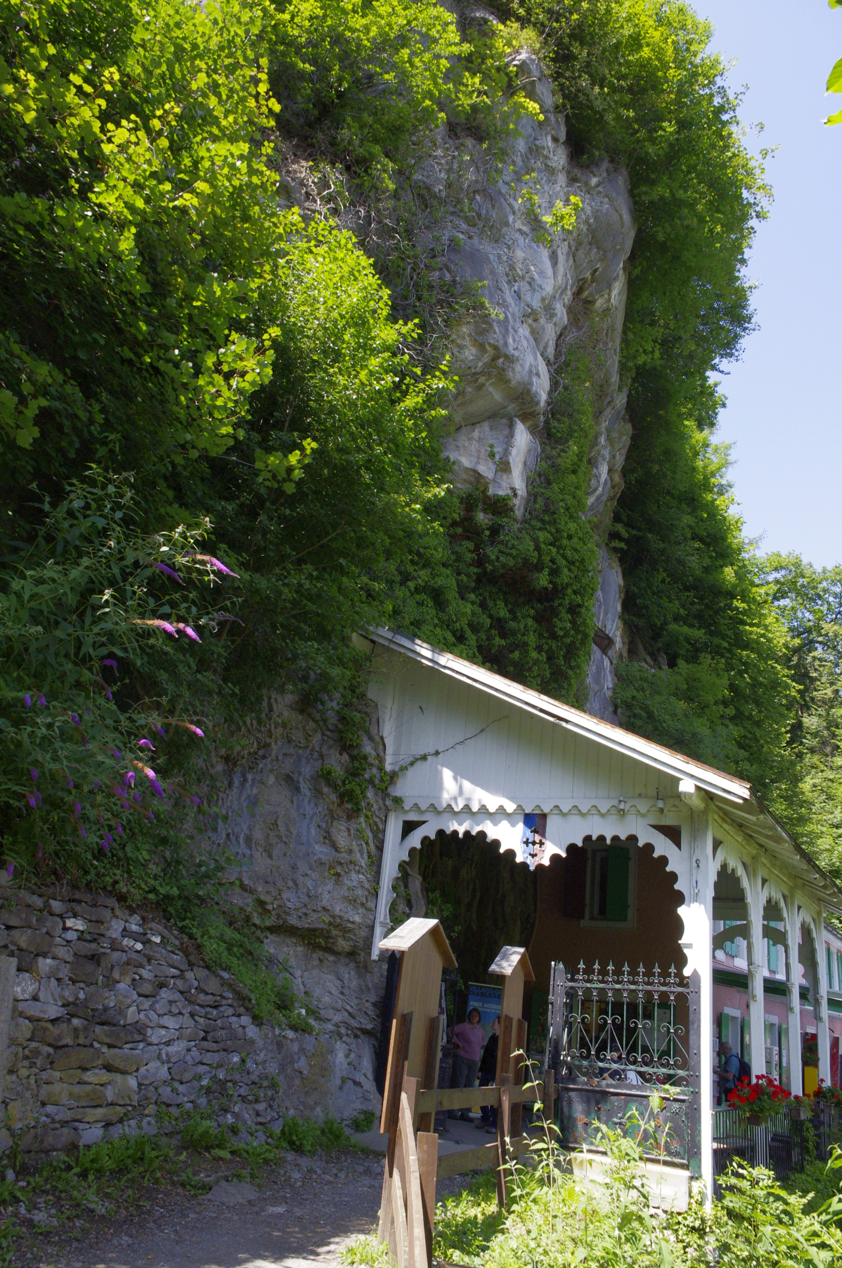 Grotte aux fées, Höhle in Saint-Maurice, Wallis, Schweiz - Eingang